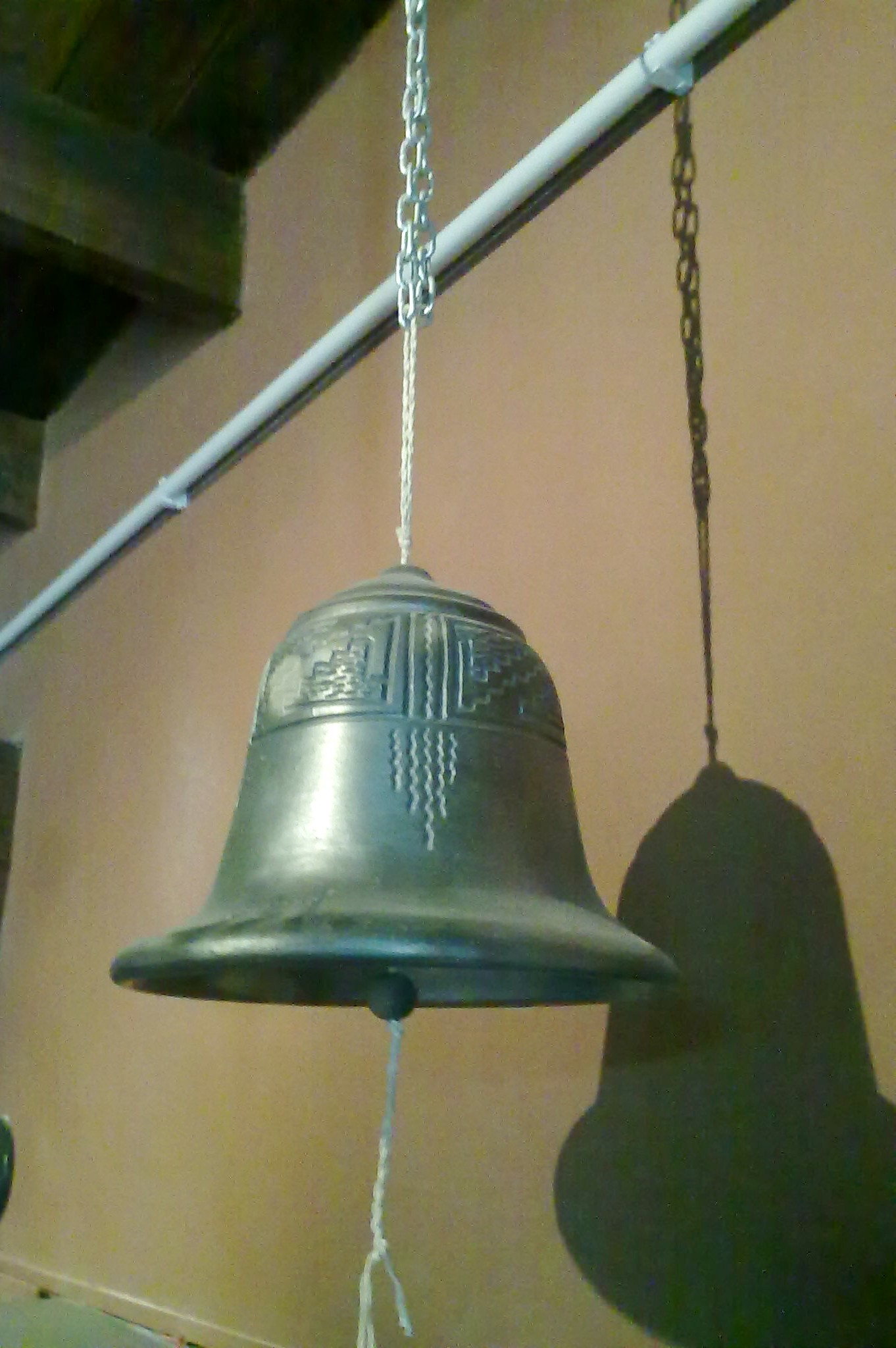 Campana de cerámica negra, de Tafí del Valle, Tucumán, expuesta en el Museo de las Campanas en Mina Clavero, Córdoba, Argentina.